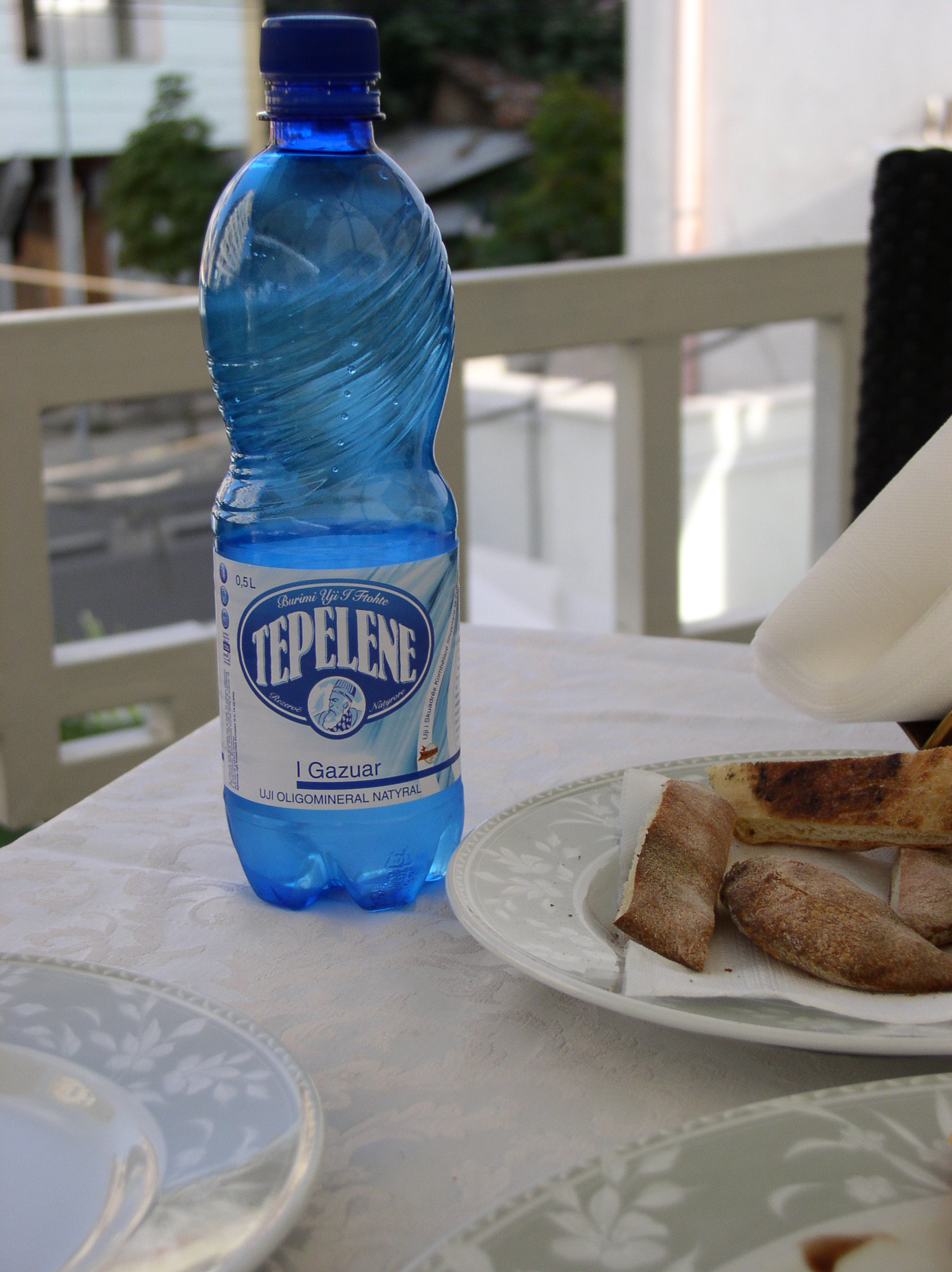 Znak sa likom Ali-paše Janjinskoj na boci mineralne vode